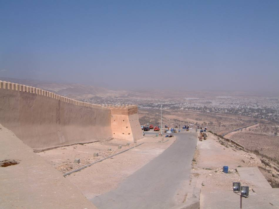 Murs de la kasbah d'Agadir